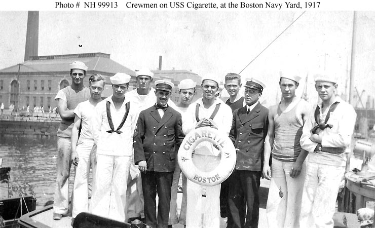 USS Cigarette, Boston, 1917